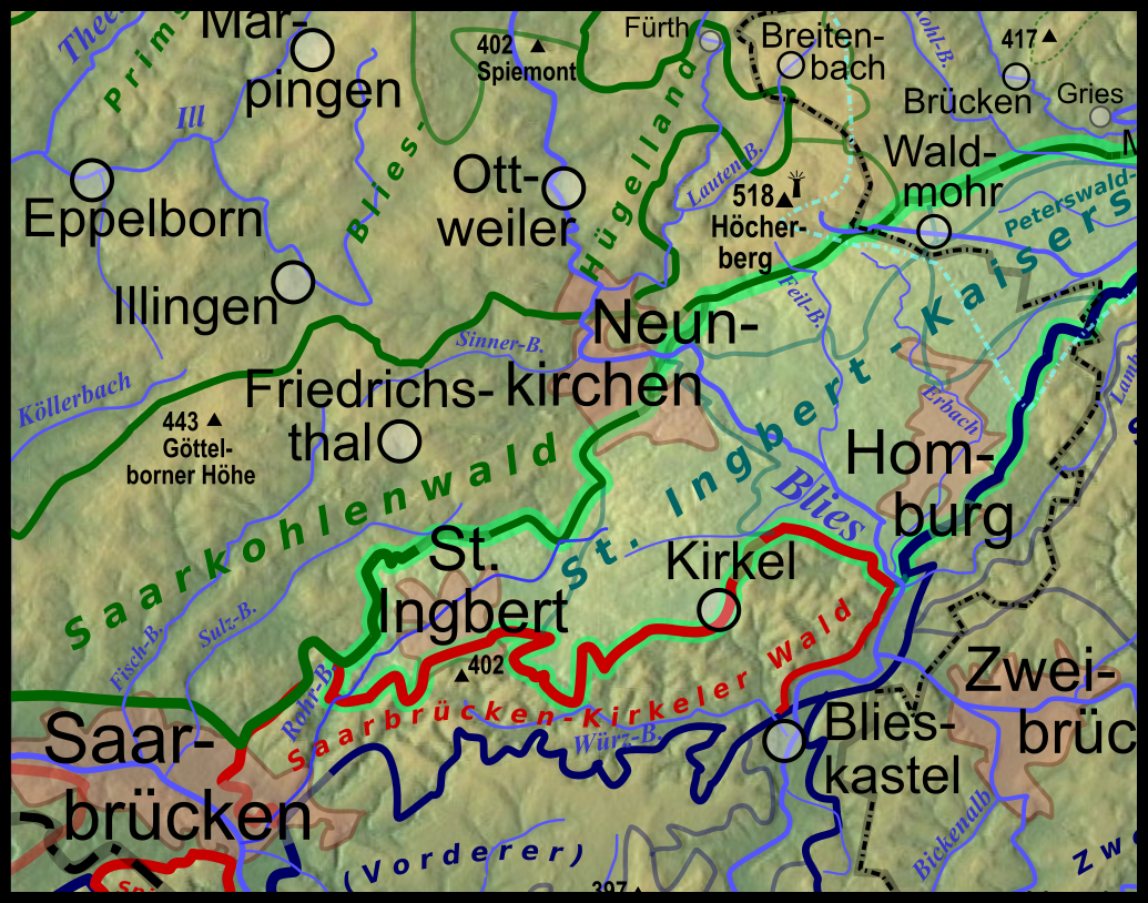 Naturräumliche Karte des Westteils der St. Ingbert-Kaiserslauterer Senke mit (von West nach Ost) St. Ingberter Senke, Kirkeler Schwelle, Homburger Becken sowie Bexbacher Riedel im Norden, südlich an den Höcherberg anschließend